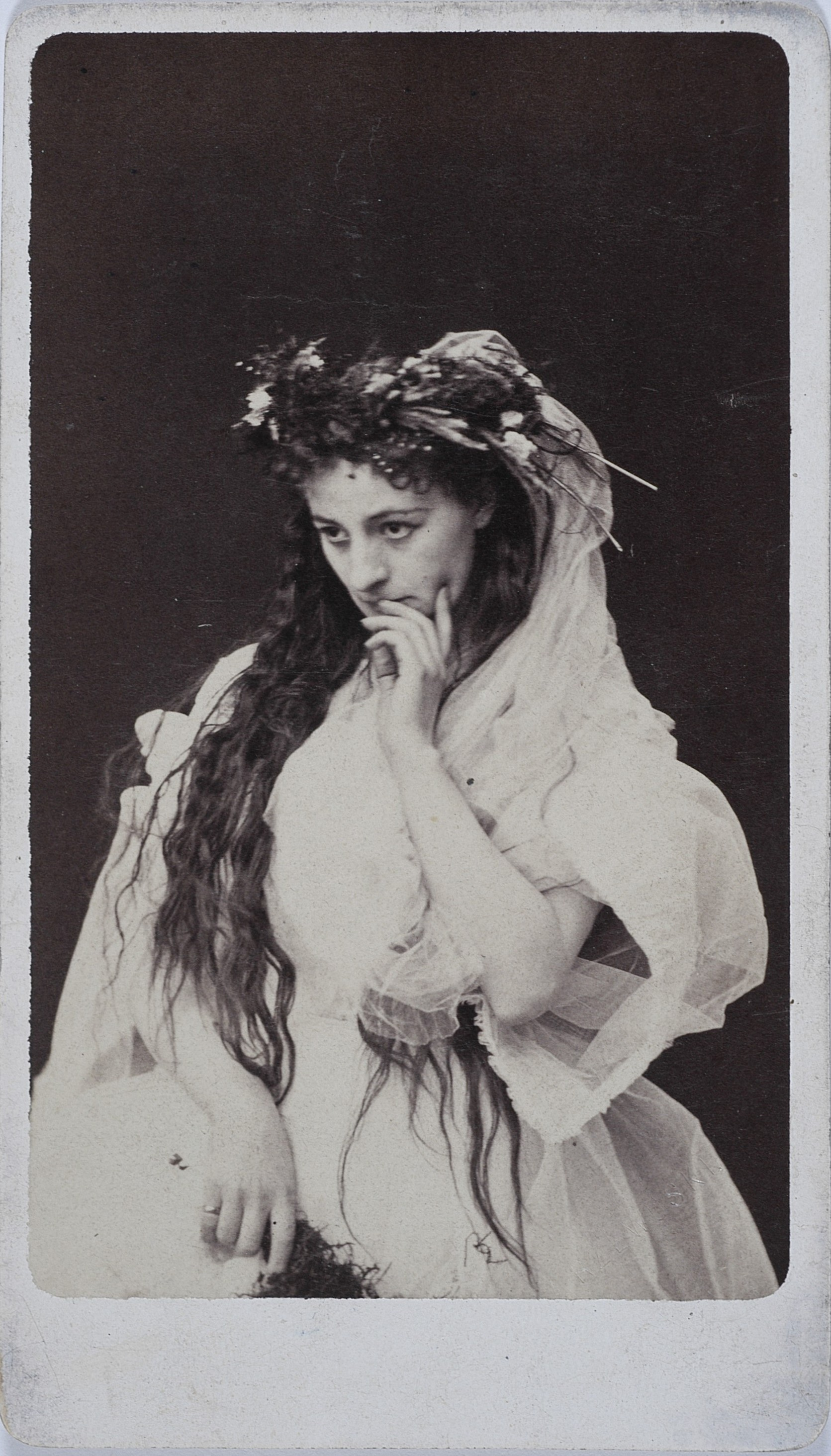 Helena Modrzejewska jako Ofelia w "Hamlecie" Williama Szekspira